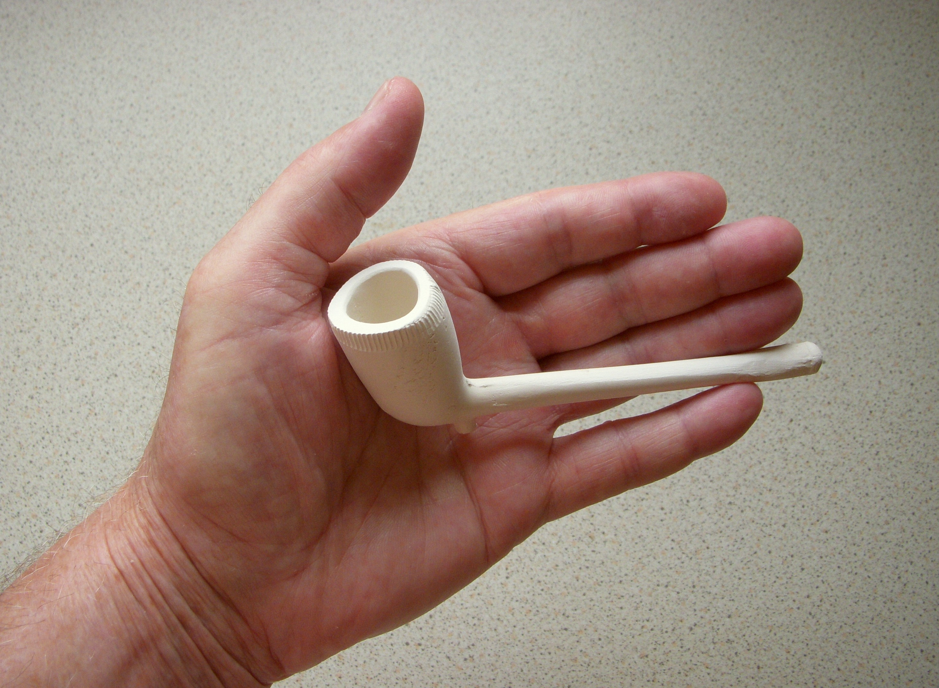 På Skansen tillverkad kritpipa